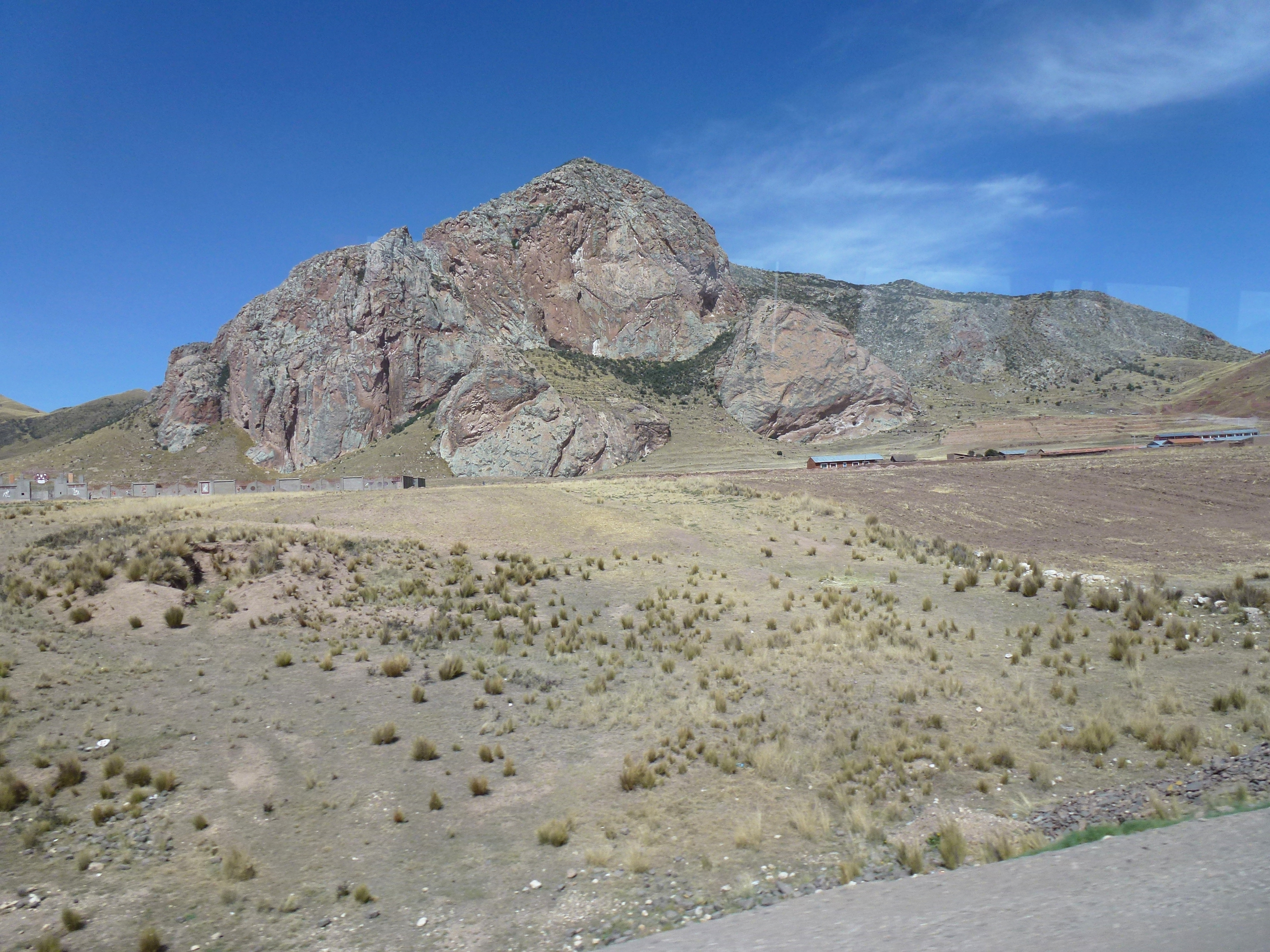 Pucará Distrito_de_Pucará_(Lampa) au Pérou.